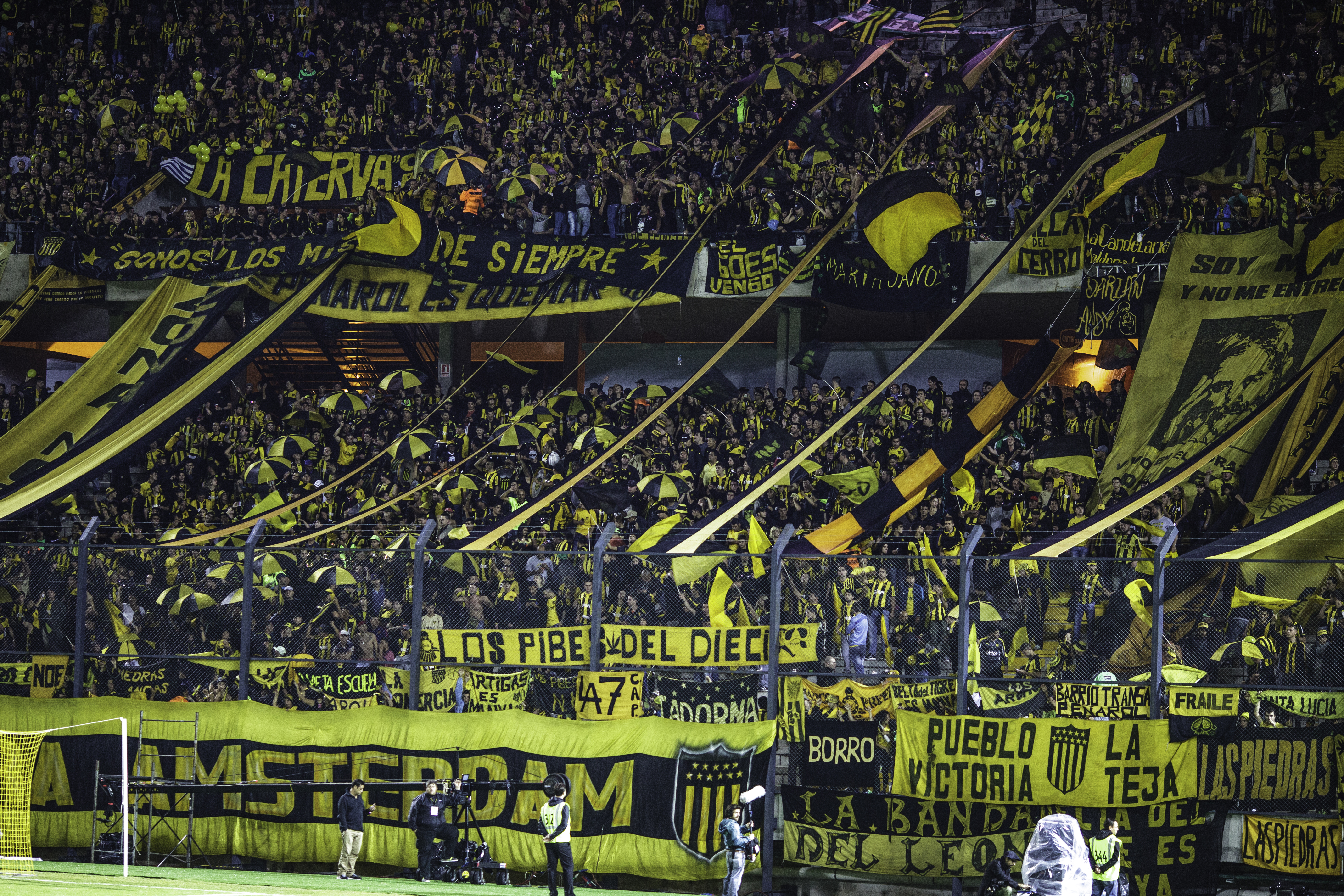 "Si Peñarol fue el primer campeón del mundo que vio América y el primer campeón Uruguayo, tenía que tener el primer estadio FIFA" Camera: Canon EOS 5D Mark II 0 ISO: 1250